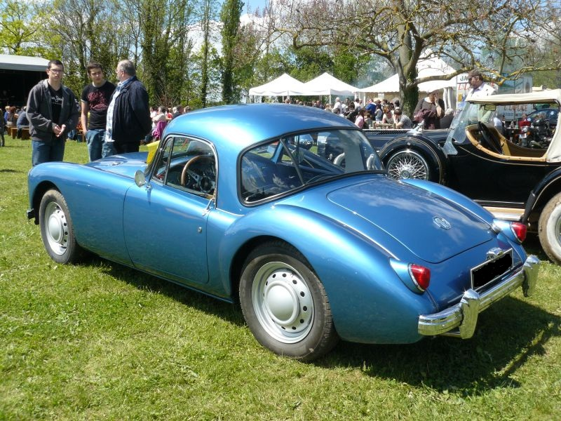 Français cadien: Photo prise à Chelles le 1er Mai 2012.